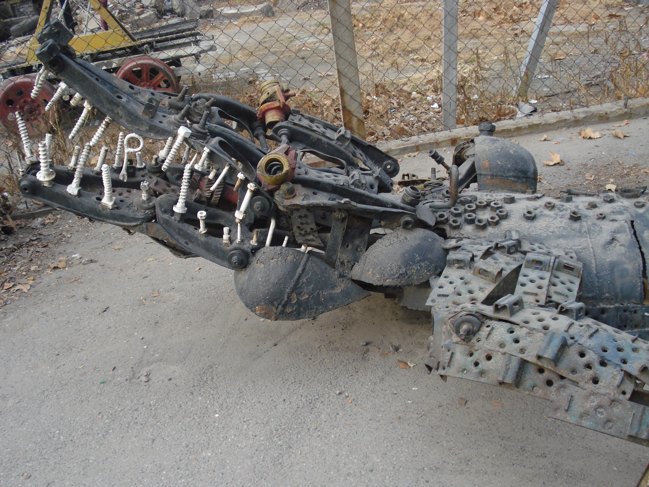 Obra del artista argentino Carlos Regazzoni.